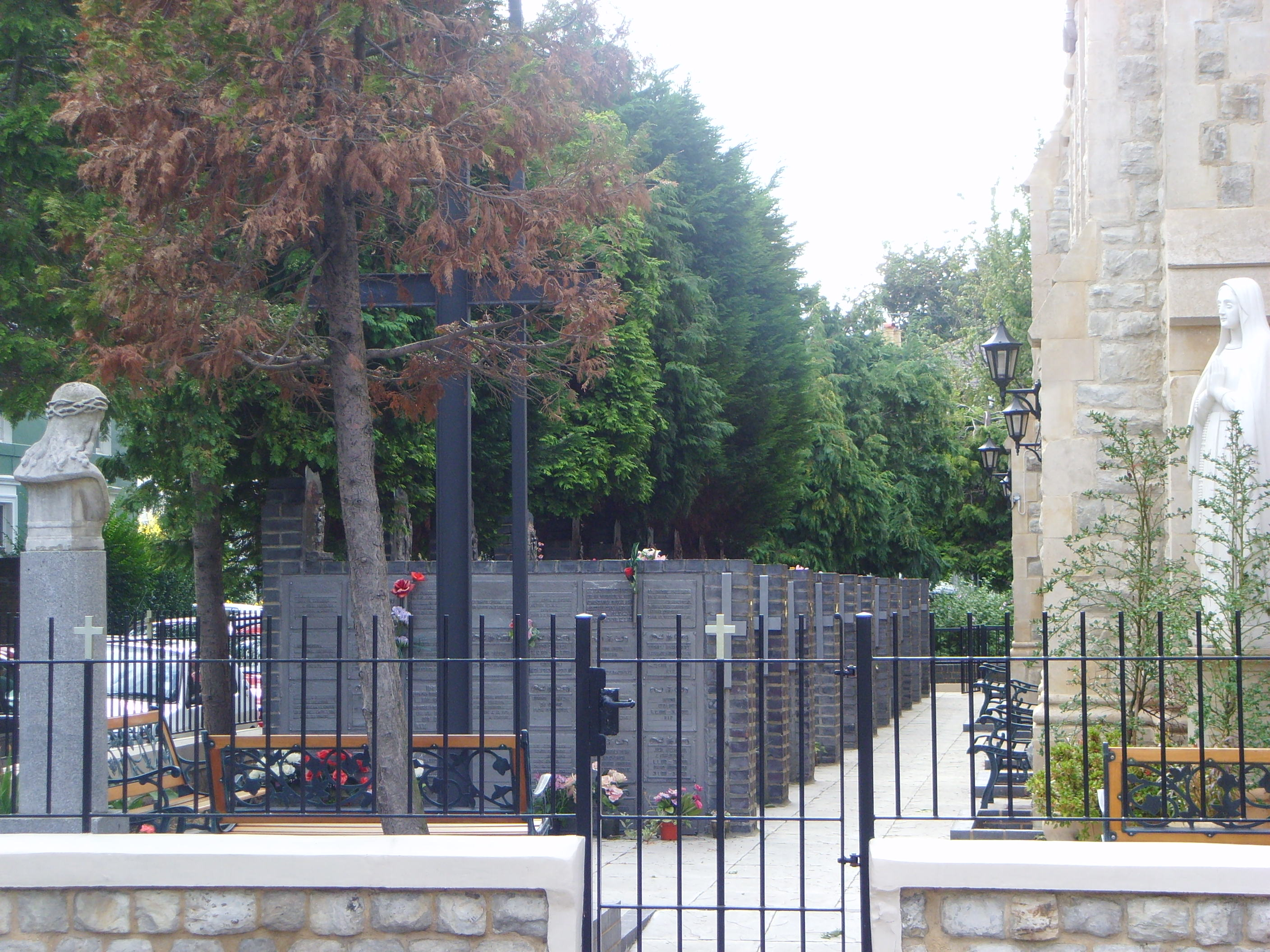 Kościół pod wezwaniem Andrzeja Boboli w Londynie